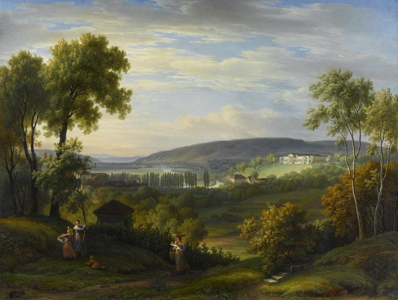 Blick auf Schloss Rosenstein und das Neckartal von Gottlob Friedrich Steinkopf, 1828, Öl auf Leinwand, 151 x 197 cm, Staatsgalerie Stuttgart.